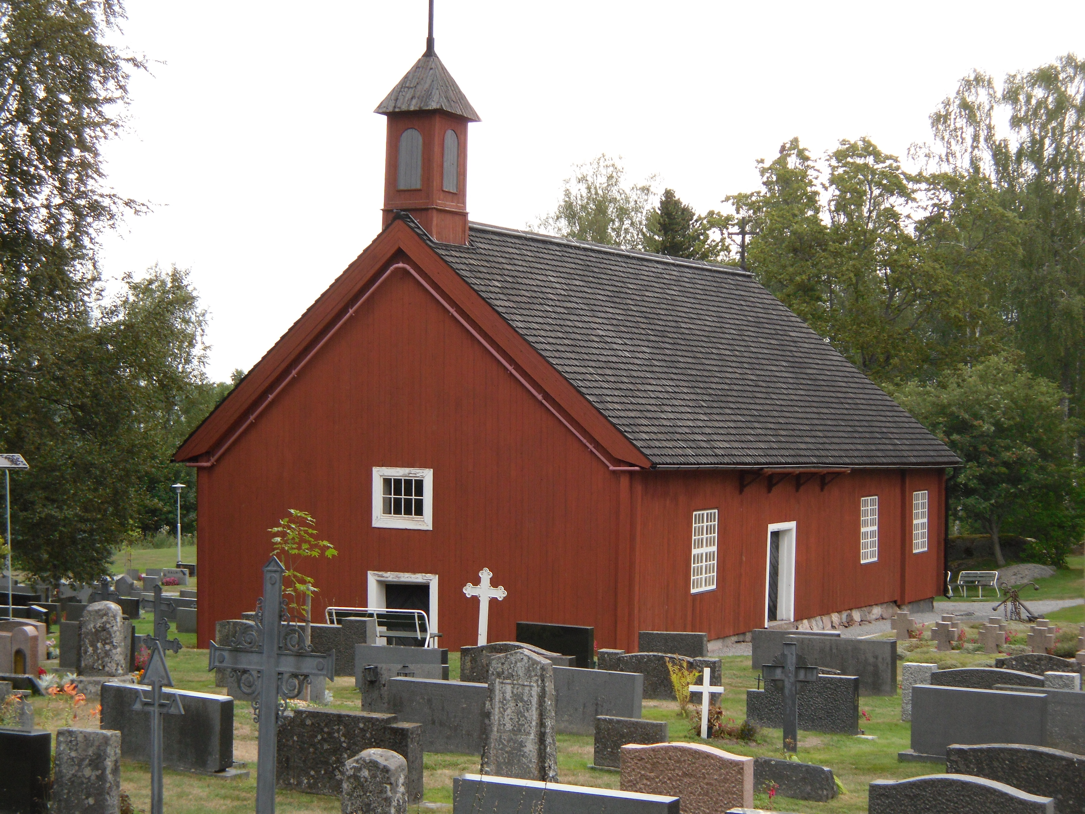 Uudenkaupungin Pyhämaan Luodon uhrikirkko